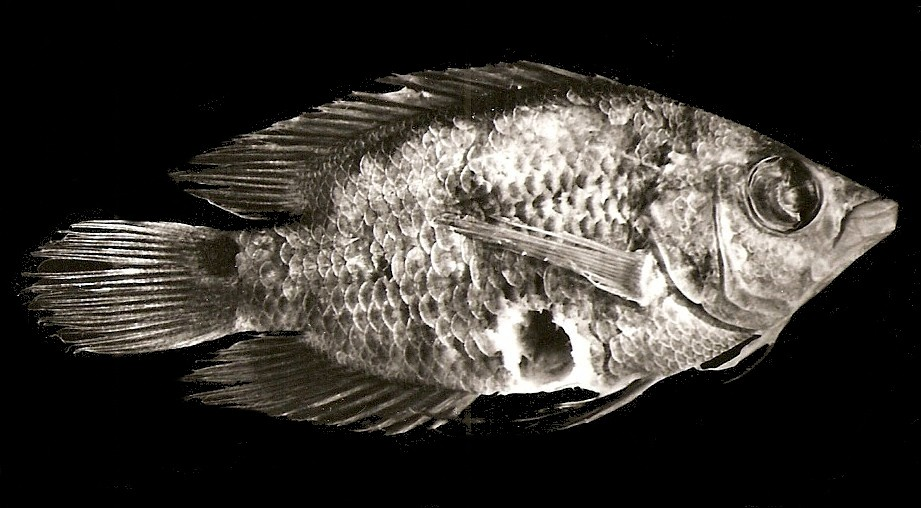 Aequidens pulcher con ulcera producida por el isopodo Artystone trysibia Isopodo Cymothoidae hectoparacito de peces en Venezuela